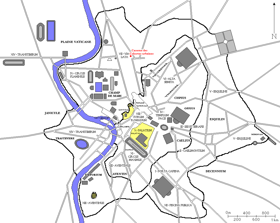 Plan de Rome redessiné à partir de diverses sources. Tous les bâtiments importants construits jusqu'à la fin de l'Empire romain sont dessinés, ainsi que les régions d'Auguste et les collines de Rome. Auteur : ColdEel En rouge, la caserne des cohortes urbaines.